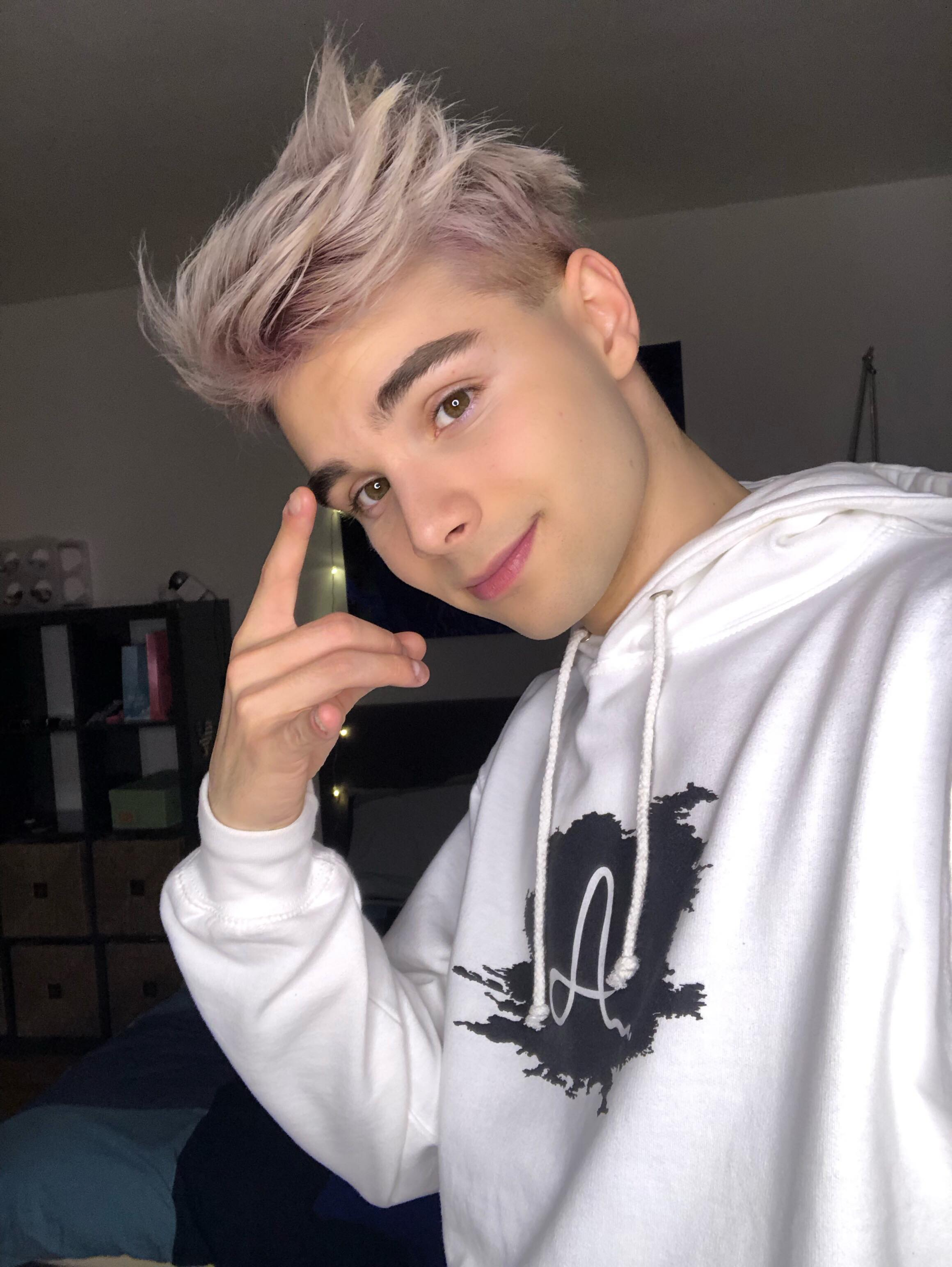 Photo of Adam Kajumi